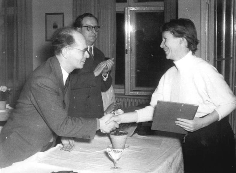 Zentralbild Junge 16.12.1954 7. Preisausschreiben zur Schaffung einer neuen Kinder- und Jugendliteratur. Am 16.12.1954 zeichnete der Stellvertreter des Ministers für Kultur Alexander Abusch in der "Möwe" in Berlin die Preisträger im 7. Preisausschreiben zur Schaffung einer neuen Kinder- und Jugendliteratur aus. UBz: Alexander Abusch (links) beglückwünscht Frau Lilo Hardel (rechts). Lilo Hardel erhält diese Anerkennung für ihr Buch "Max und Lottchen in der Schule".